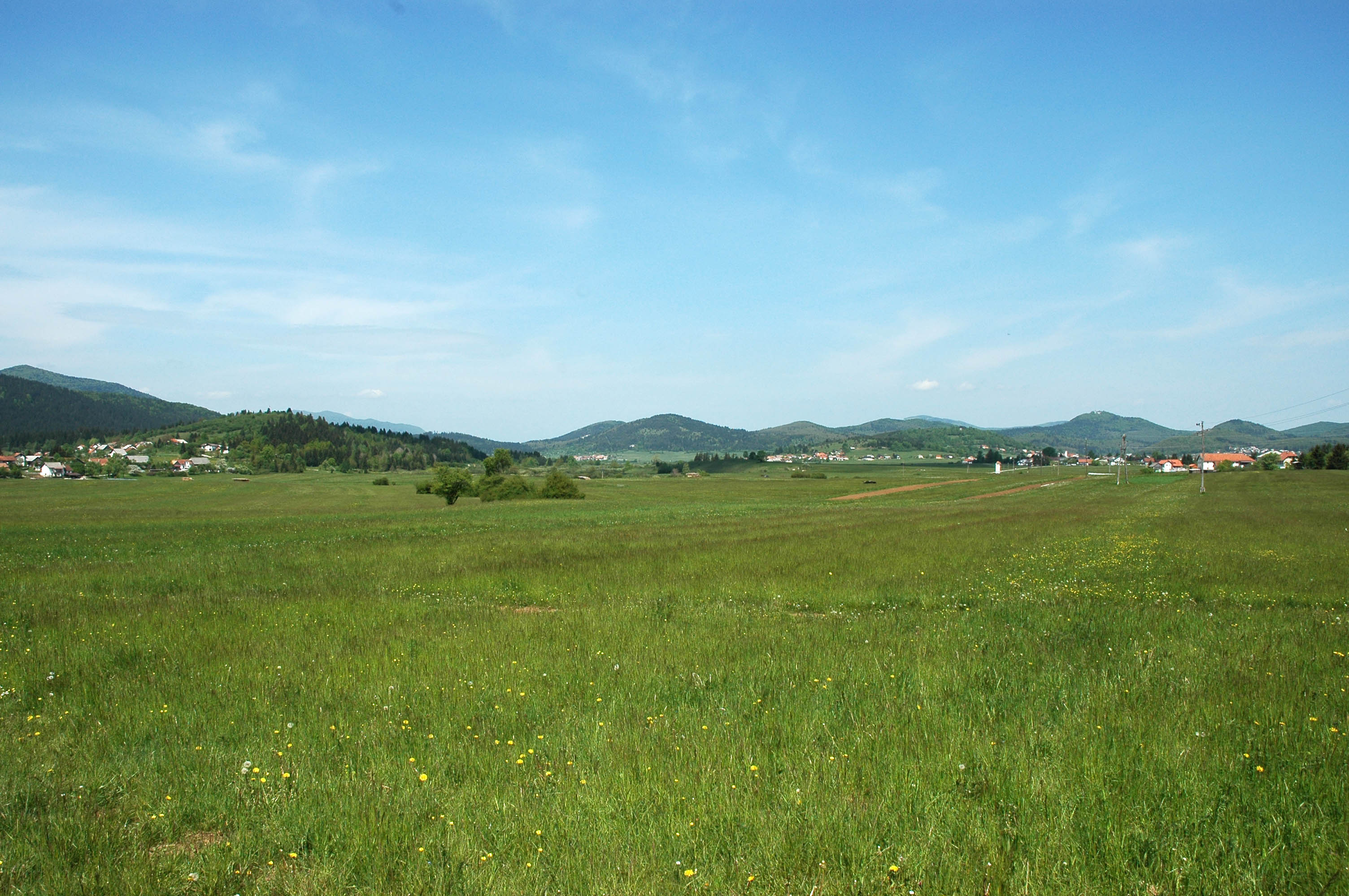 Foto: Alenka Veber, Loška dolina